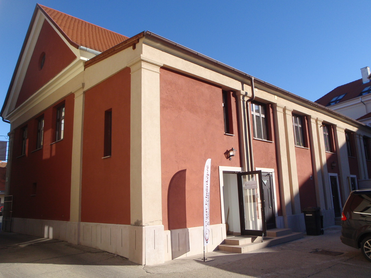 Szombathelyi ortodox zsinagóga udvara